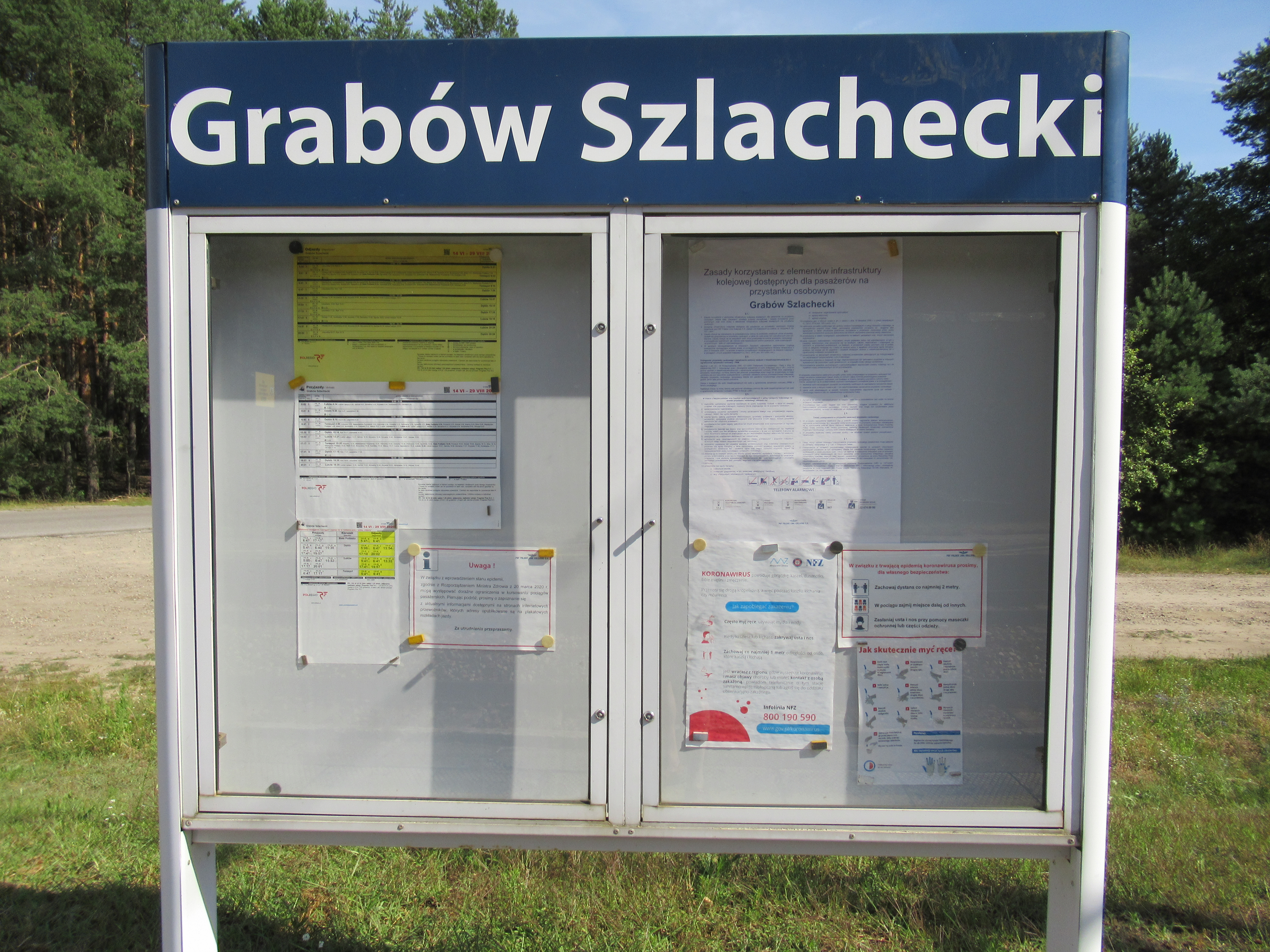 Przystanek kolejowy w Grabowie Szlacheckim (pow. rycki, woj. lubelskie, Polska). Gablota z rozkładem jazdy i innymi informacjami.